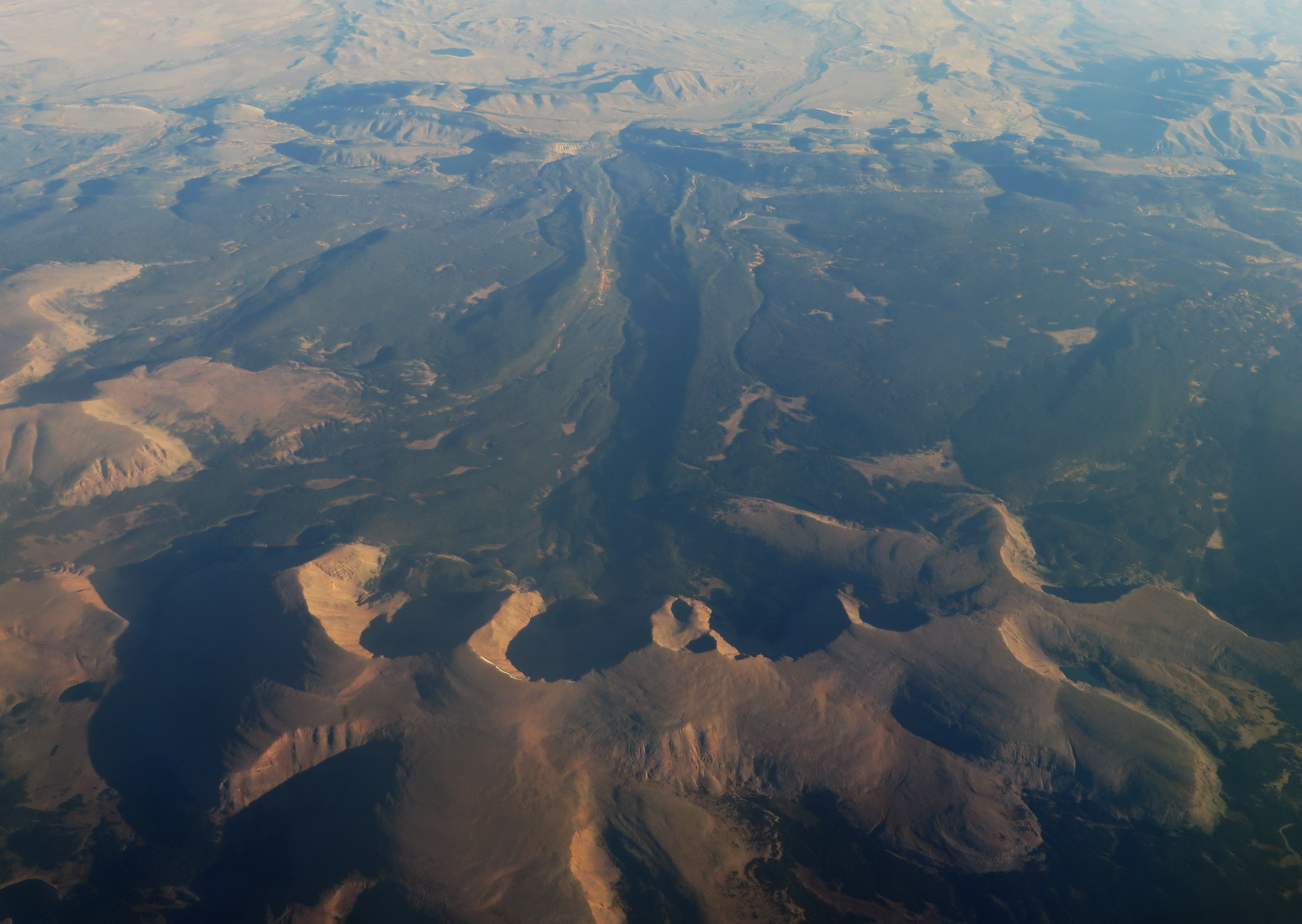 Glacial cirques